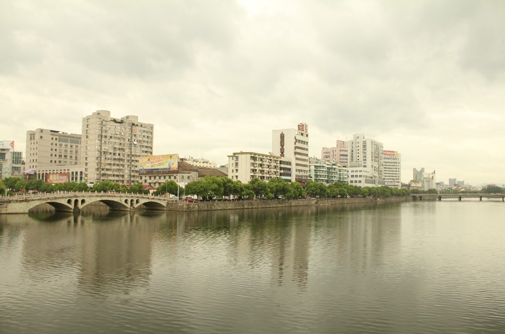 浙江省永康市三江交汇处